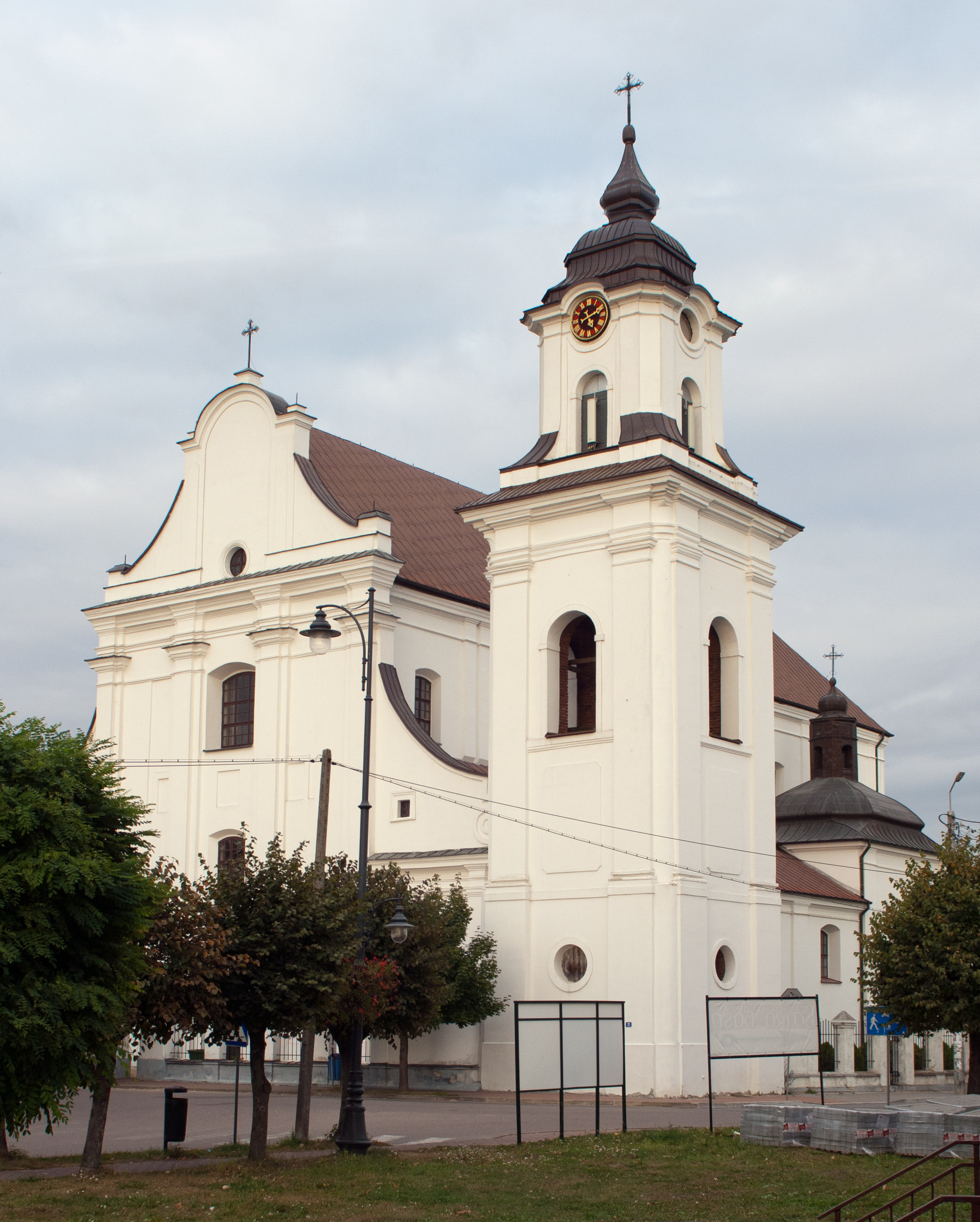 Drohiczyn, Kościół Franciszkanów pw. Wniebowzięcia NMP (budowa: 1682-1715) z ołtarzem głównym z 1762, zbudowany w miejscu kościoła z 1400 fundacji wojewody Mikołaja Nasuty